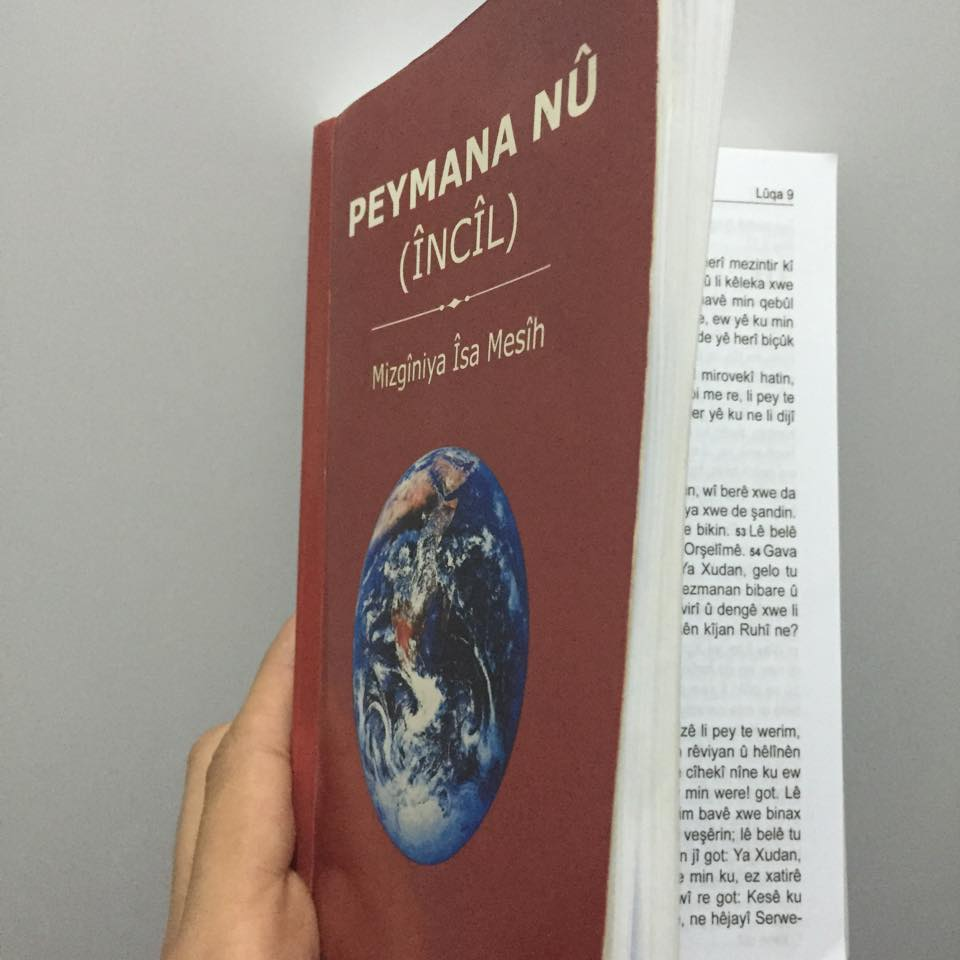 Kürtçe İncil (Mîzgîniya Îsa Mesîh)